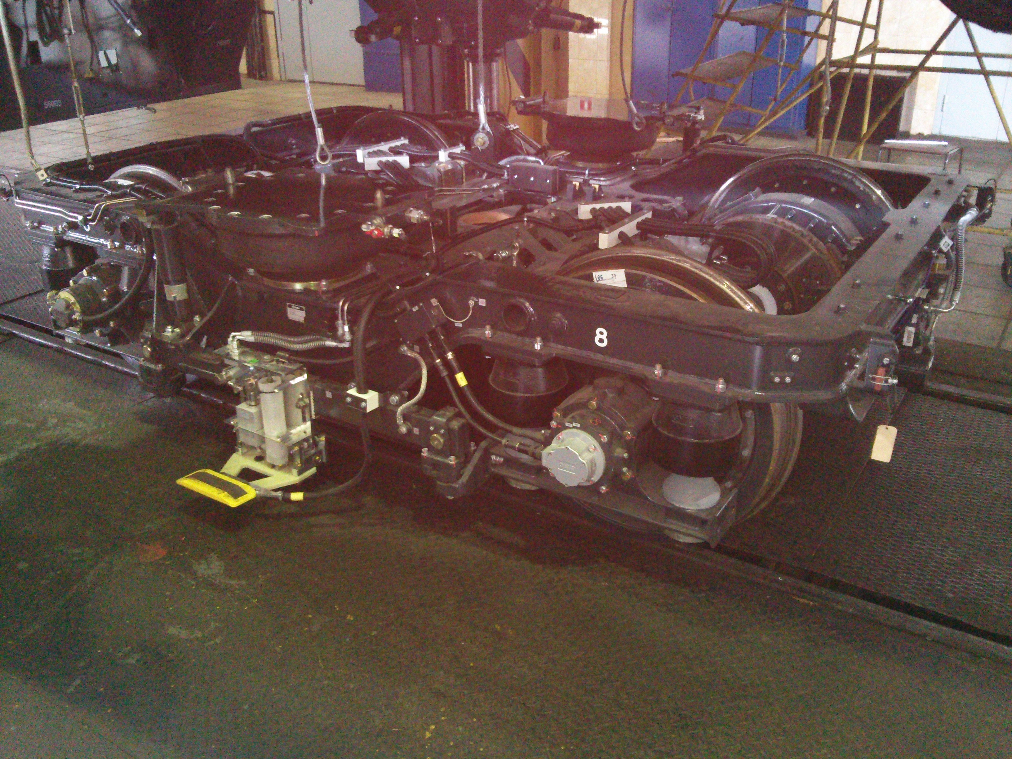 Моторная тележка вагона метро 81-556 НеВа